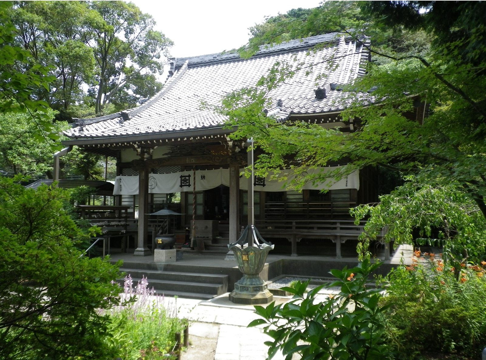 安国論寺本堂